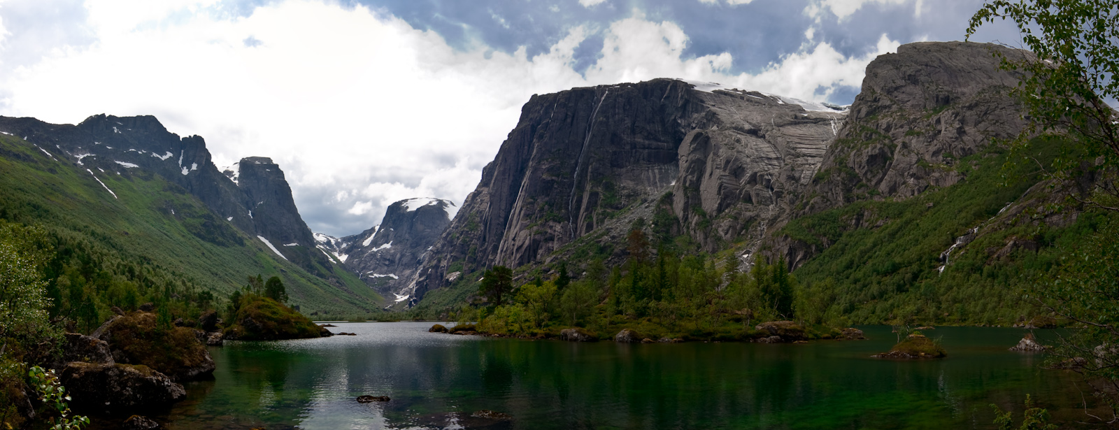 Skjerdalsbotnen ved Skjerdalsvatnet